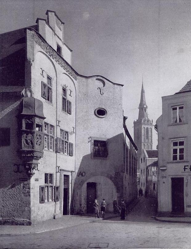 Das Gewandhaus in Düren, im Hintergrund die alte Annakirche